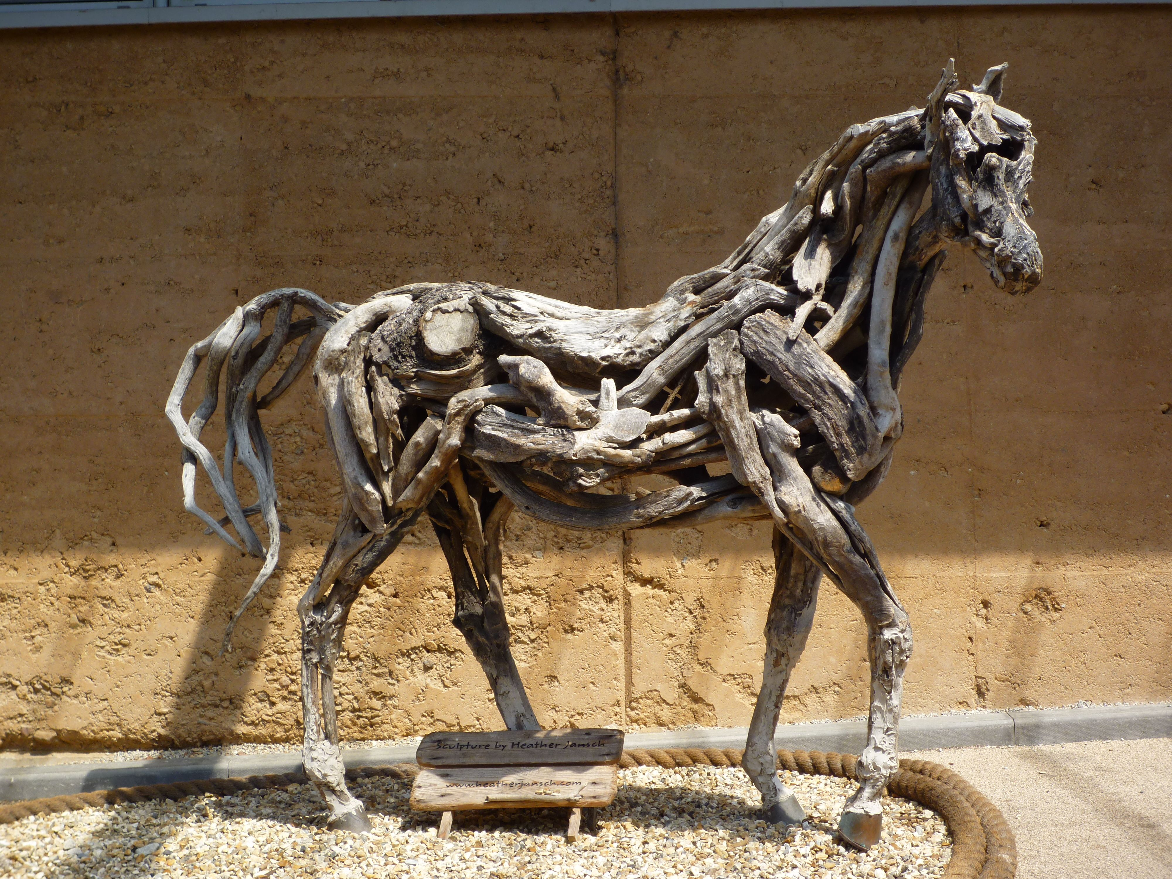 St. Austell - Eden Projekt, Skulptur Pferd aus Triftholz - "The Eden Horse" by Heather Jansch